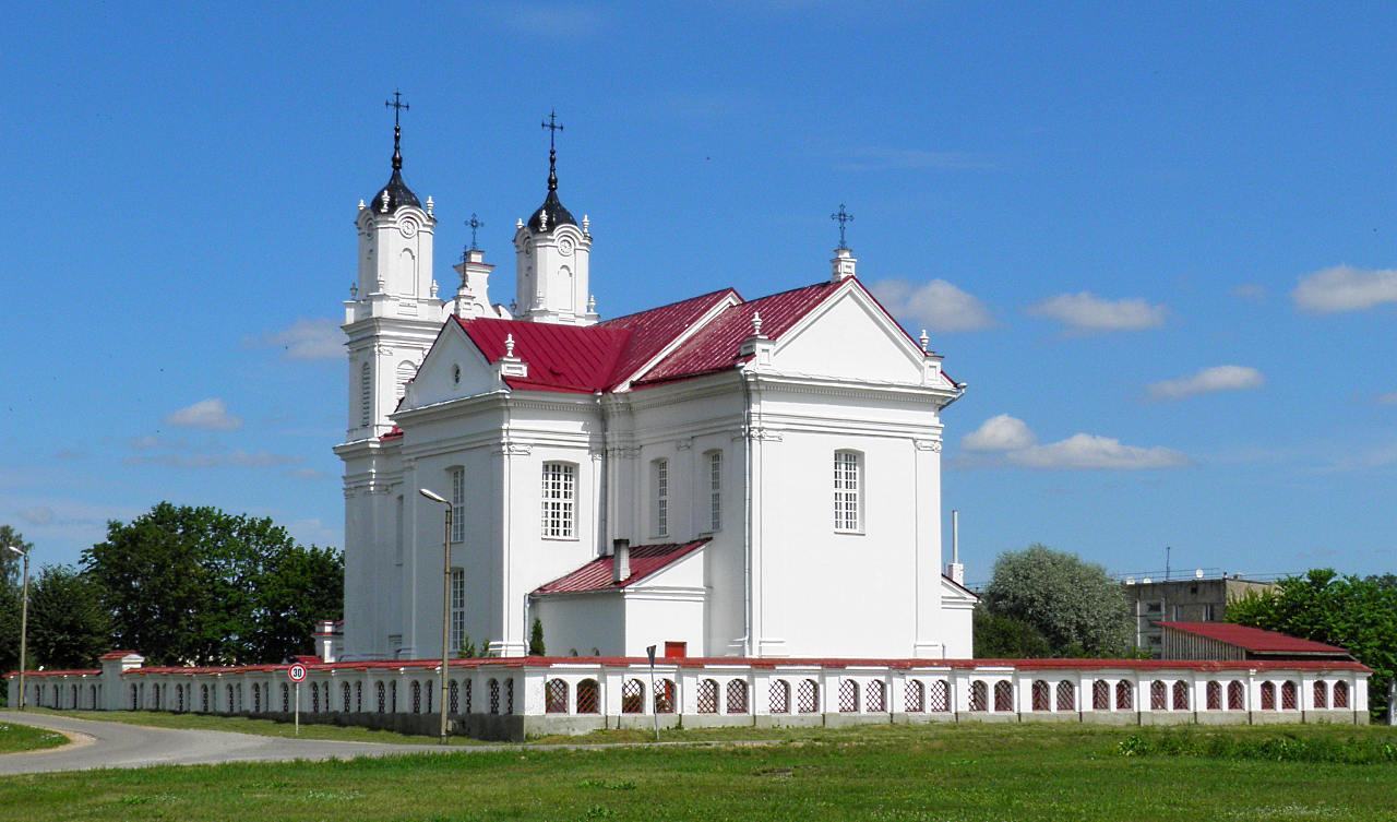 Двиетская церковь / Dvietes katoļu baznīca (2)